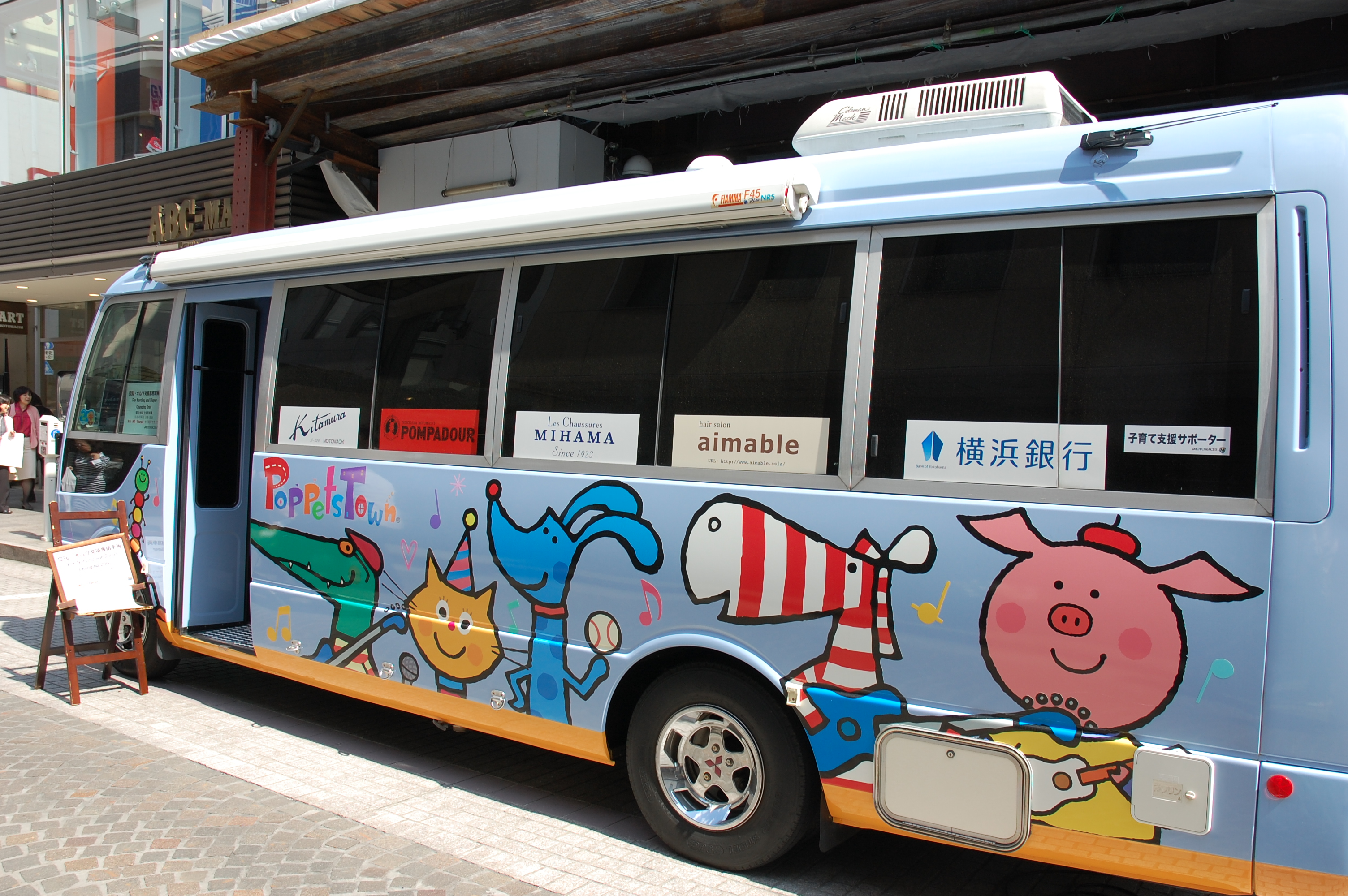 横浜・元町商店街に授乳・オムツ替え専用バス「ポペッツタウン号」 ヨコハマ経済新聞 2009年02月02日 ポペッツタウン号について